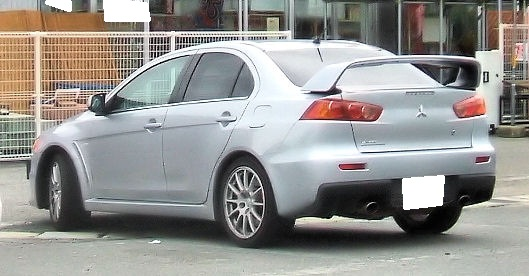 三菱・ランサーエボリューションX